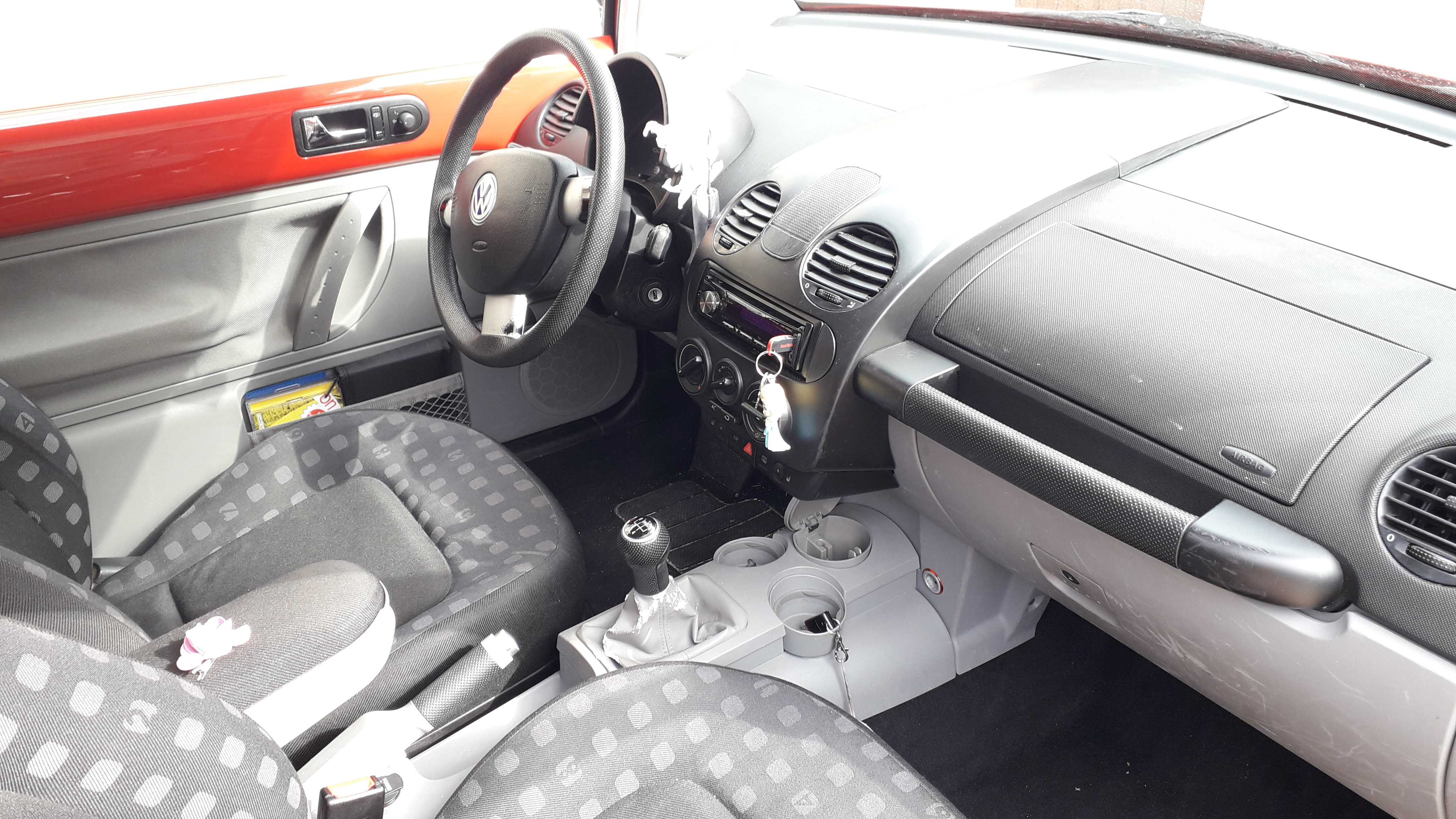 Intérieur bicolore d'une New Beetle de 1999 de couleur rouge.